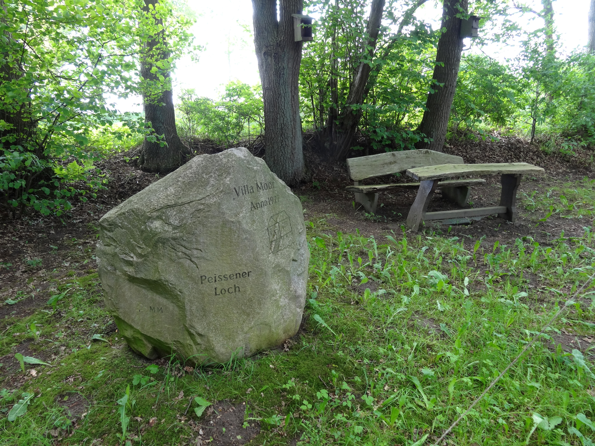 Das Peissener Loch, ein Geotop aus der Eem-Warmzeit. Dieser Stein zeigt nicht den Standort des Peissener Loches. Dieses befindet sich ca. 500 Meter weiter südlich an der Strasse und ist nicht ausgeschildert.